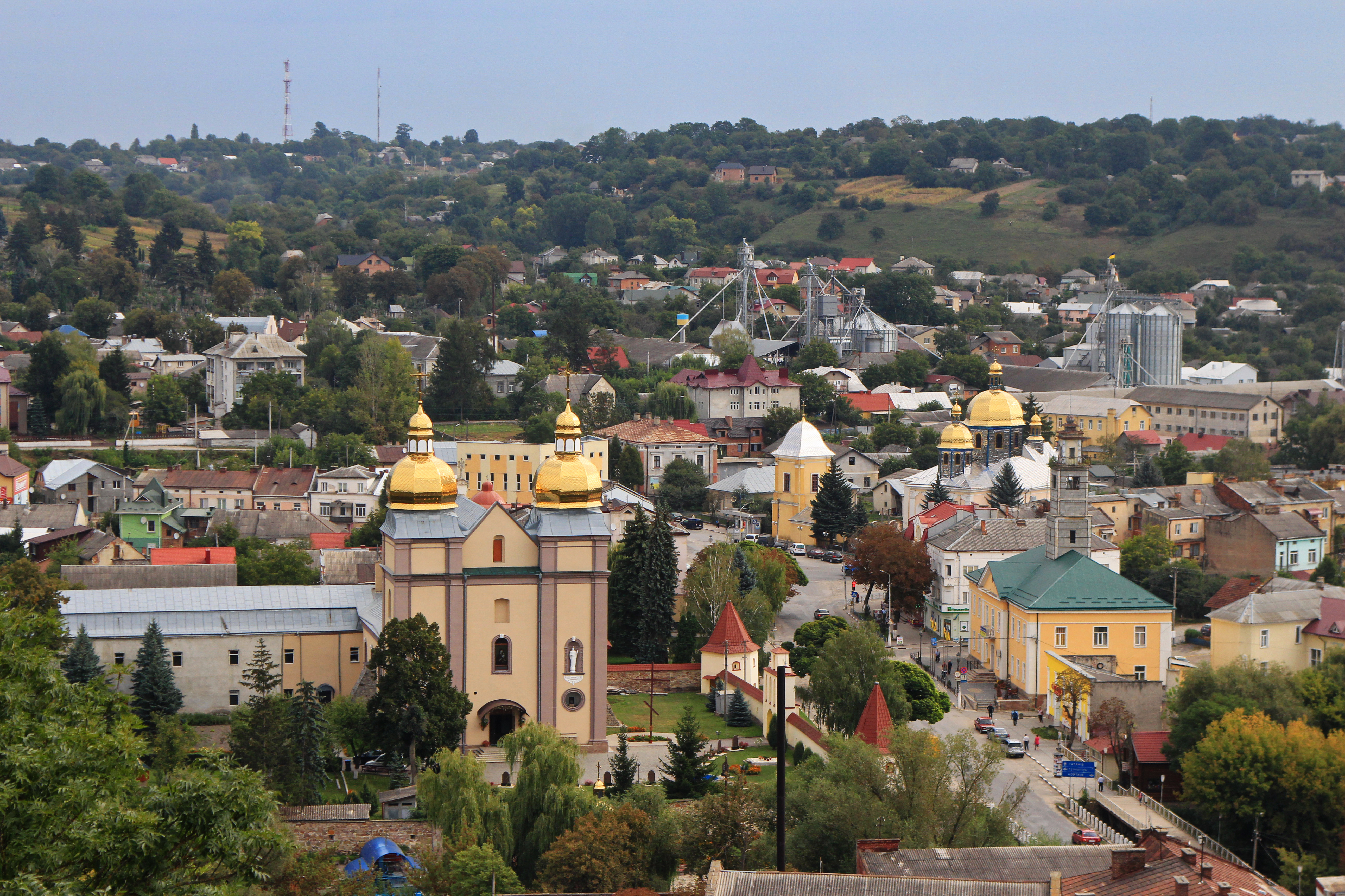 Костел Успіння Діви Марії, м. Теребовля, вул. Шевченка, 3